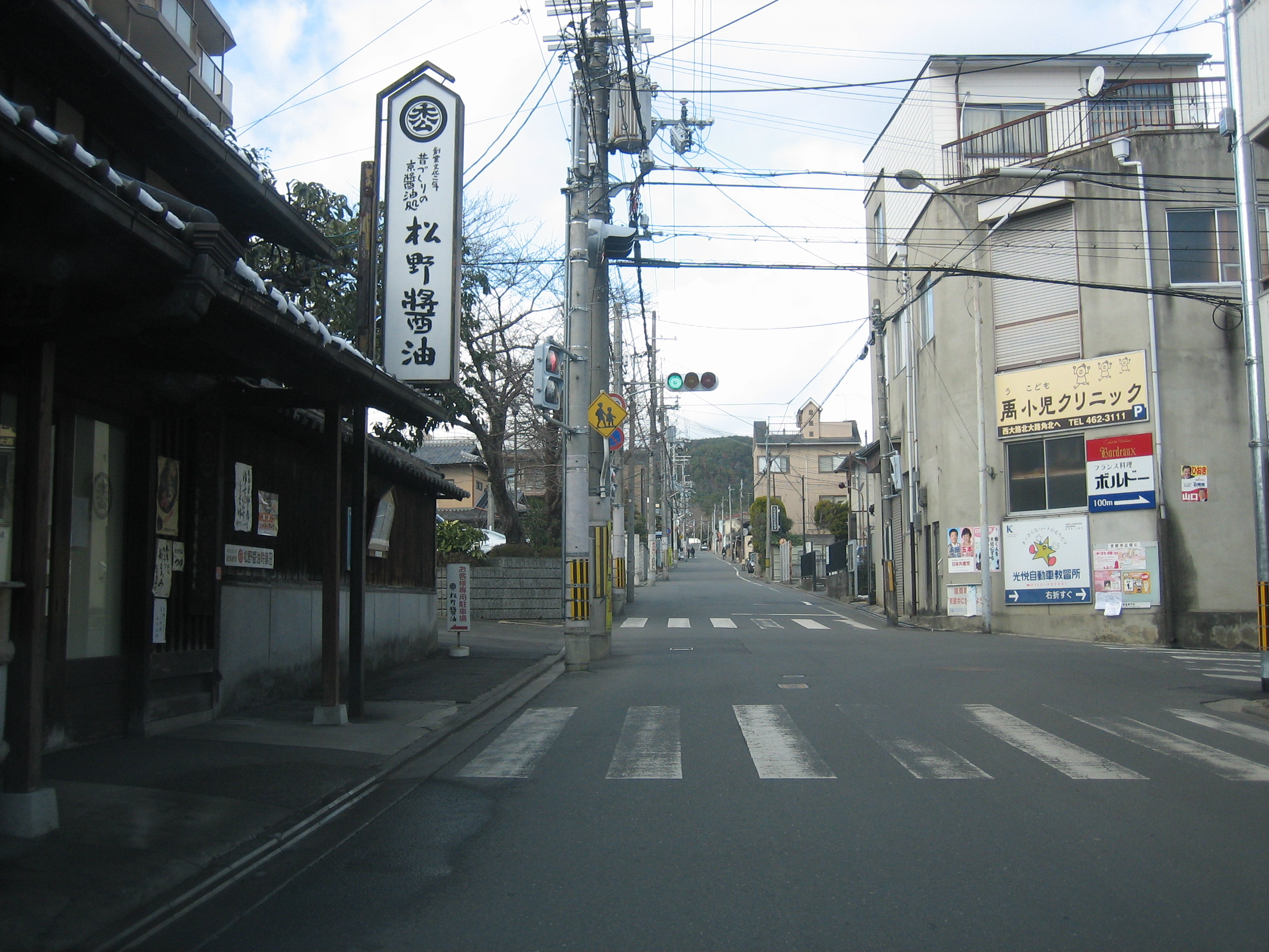 鷹峯街道を京都市北区鷹峯土天井町から撮影